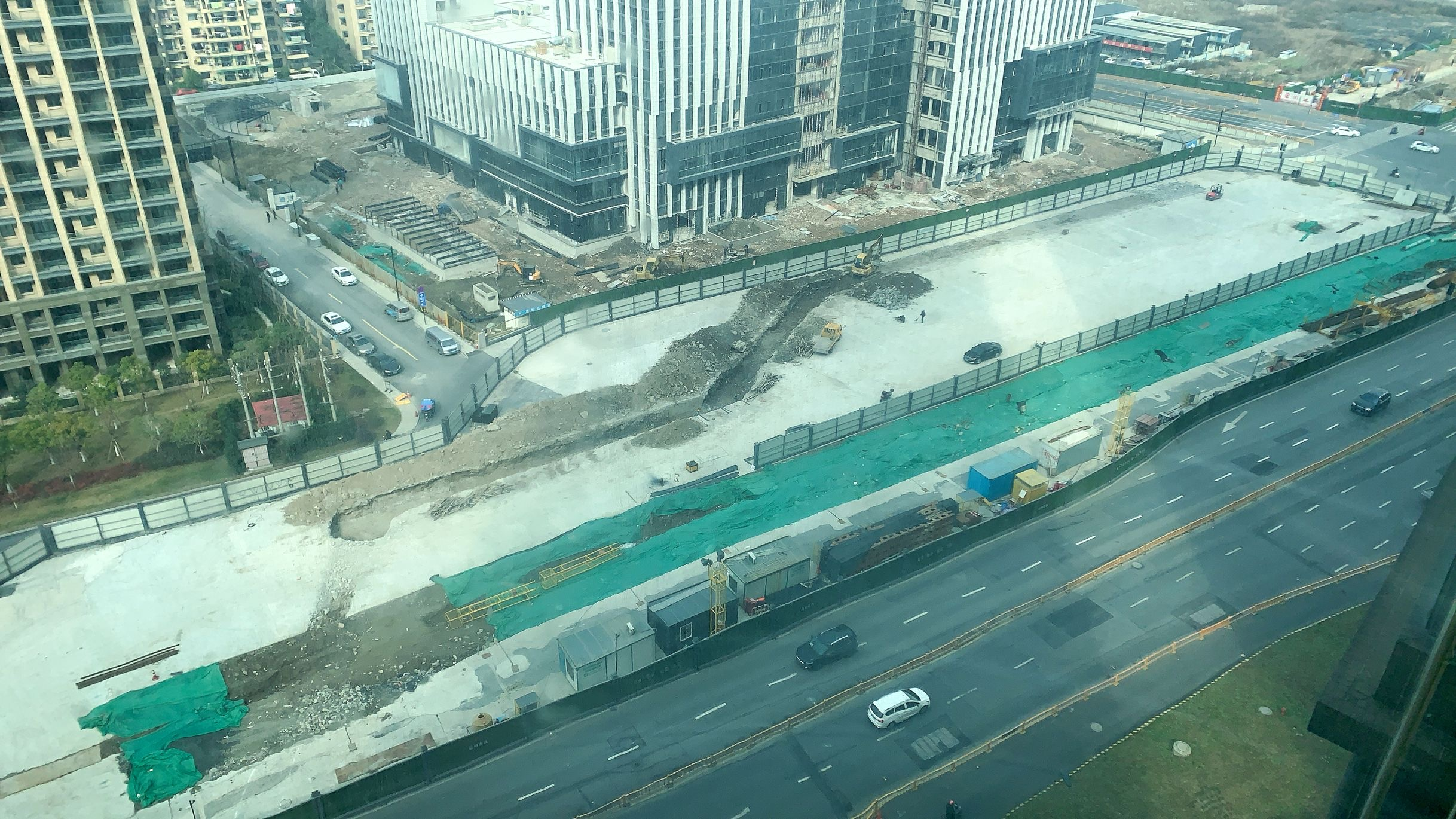 渔人码头站工地，2020年1月1日